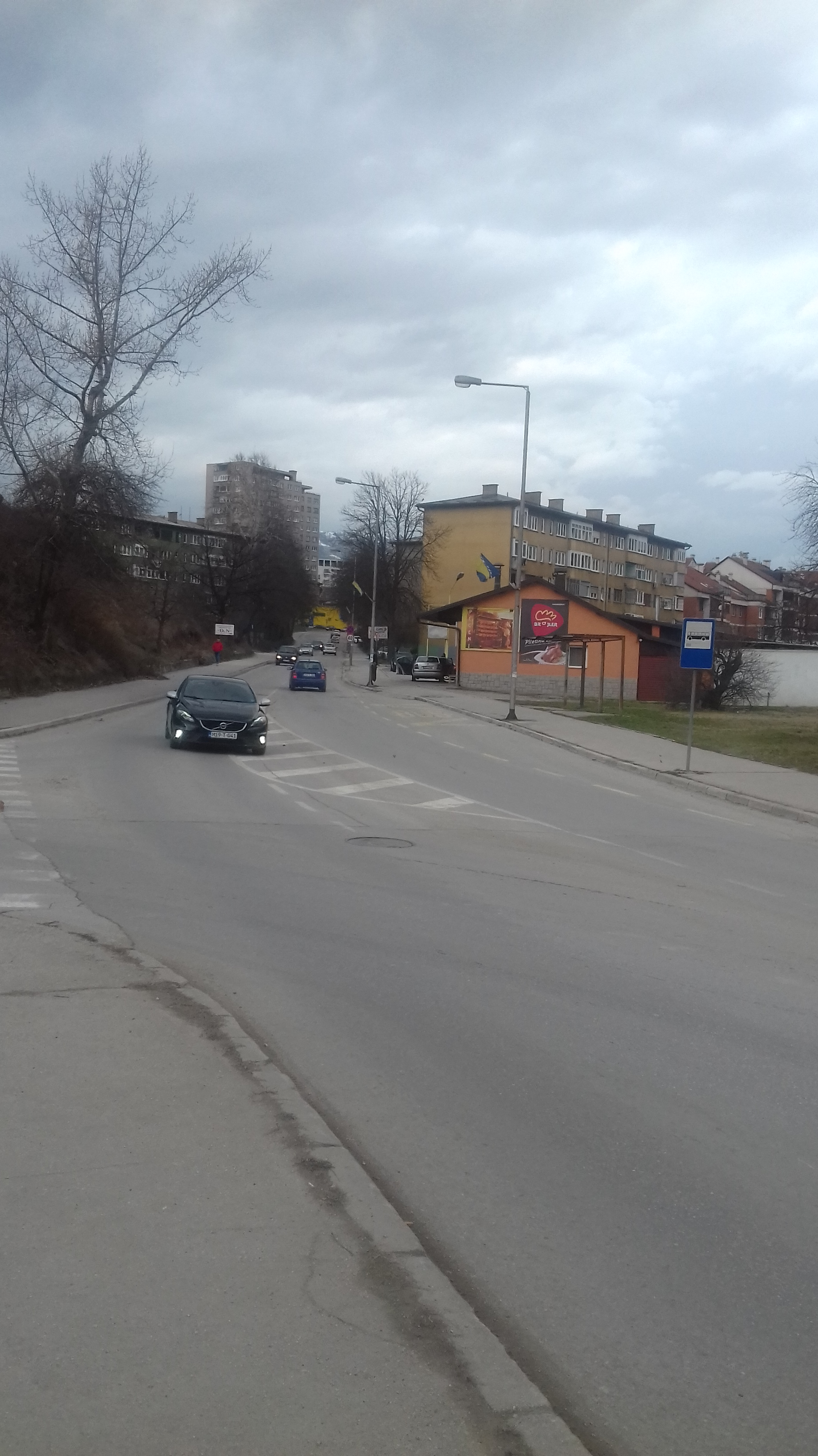 Улаз у Црквице